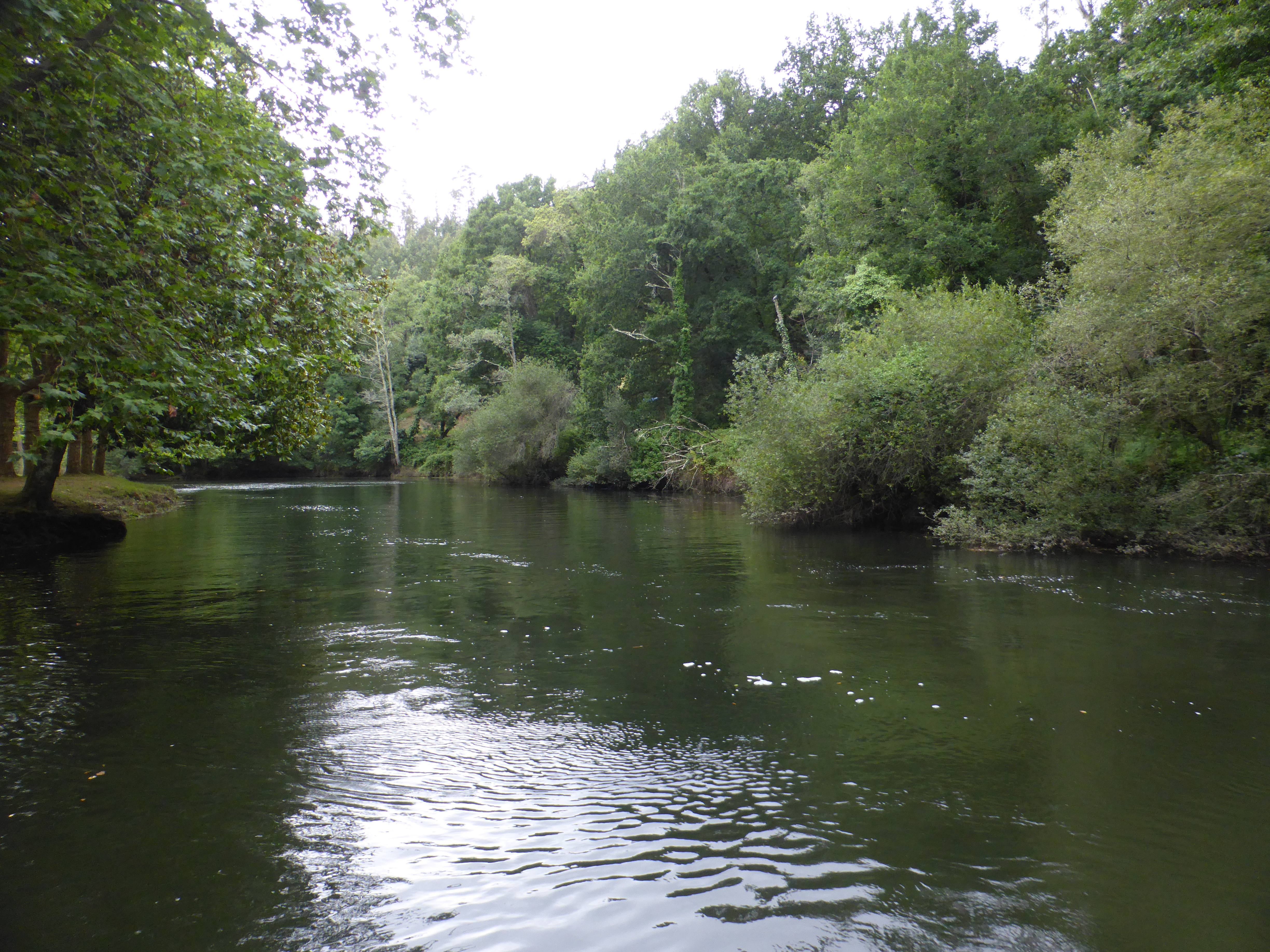 El río Mandeo junto al campo de Os Caneiros.